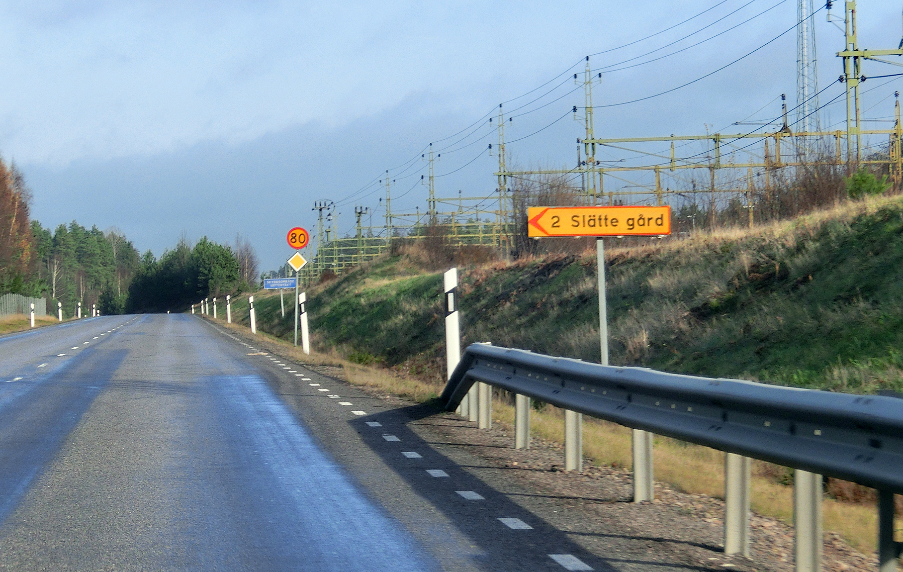 Länsväg 200 och Västra stambanan löper parallellt i höjd med Slätte i Fredsbergs socken, Töreboda kommun, f.d. Skaraborgs län, Västergötland, Västra Götalands län, Sverige.